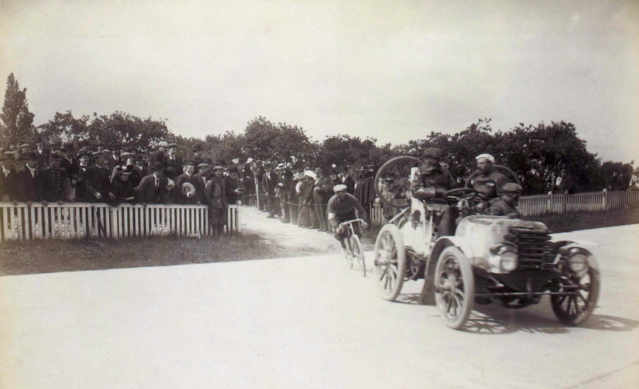 [Collection Jules Beau. Photographie sportive] : T. 9. Année 1899 / Jules Beau : F. 20. [Course Bordeaux - Paris, 1899]